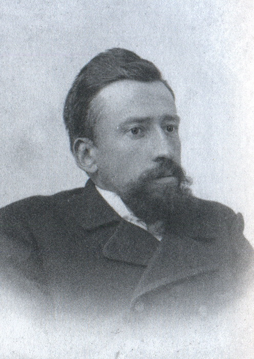 Карусь Каганец